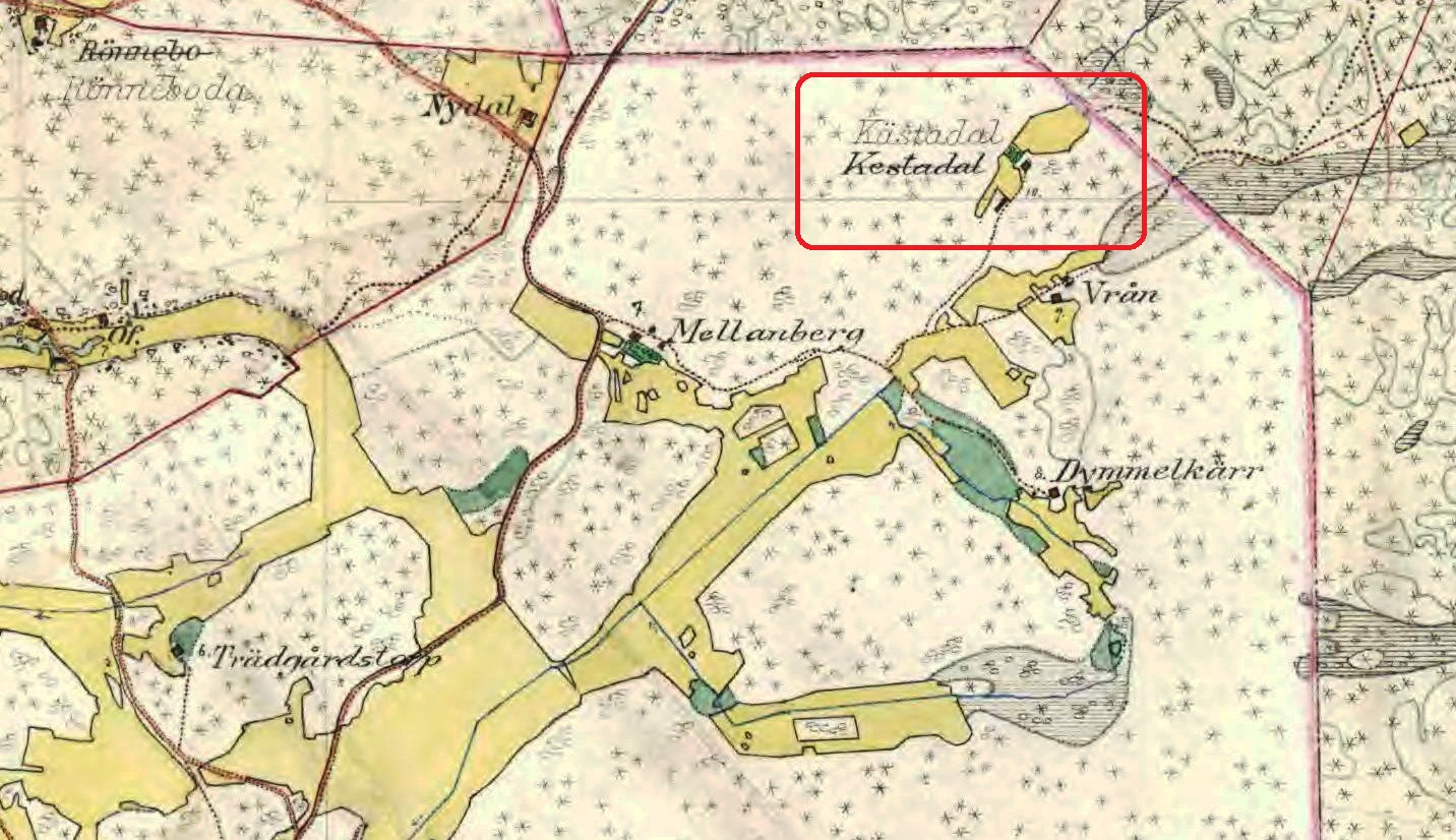 Trädgårdstorp, Mellanberg, Dymmelkärr, Vrån, Kästadal (inom röd markering) var torp under Tullinge gård